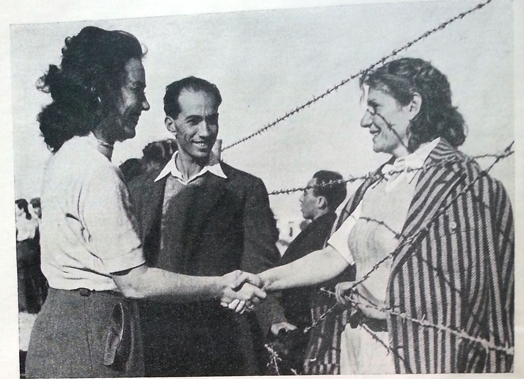 במחנה העולים בקריית שמואל (מאוסף לשכת עלית הנוער), צולם עד 1947